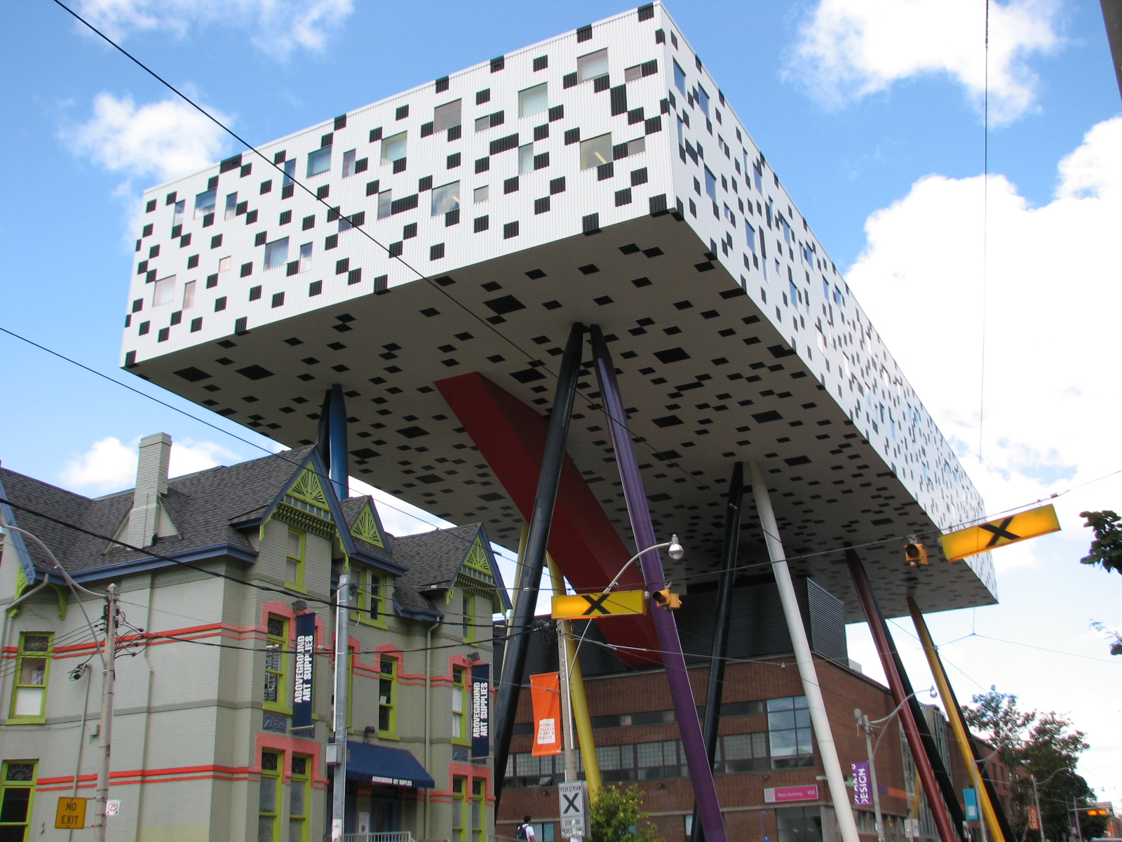 Toronto CA